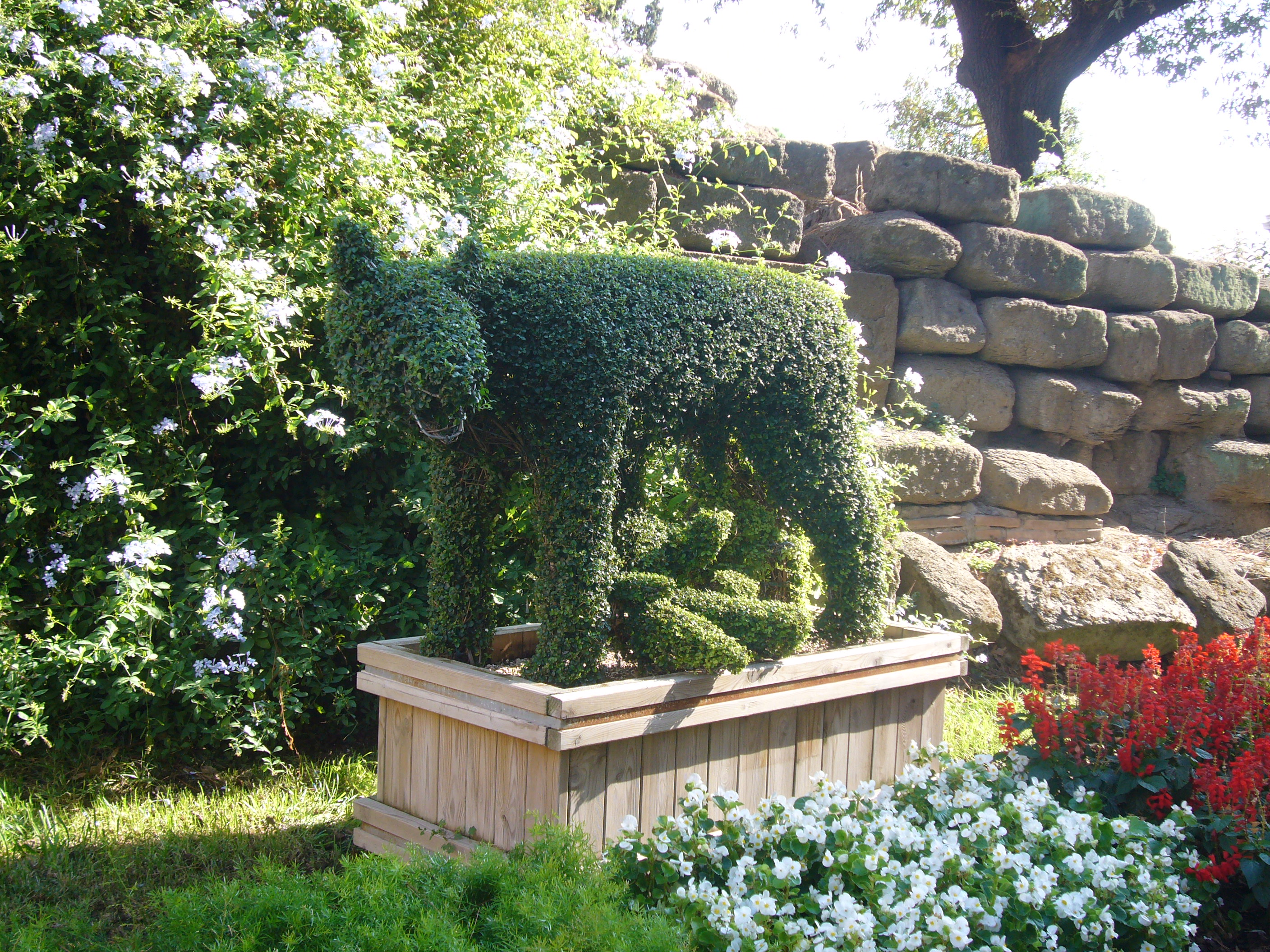 Roma, topiario della lupa a Campidoglio